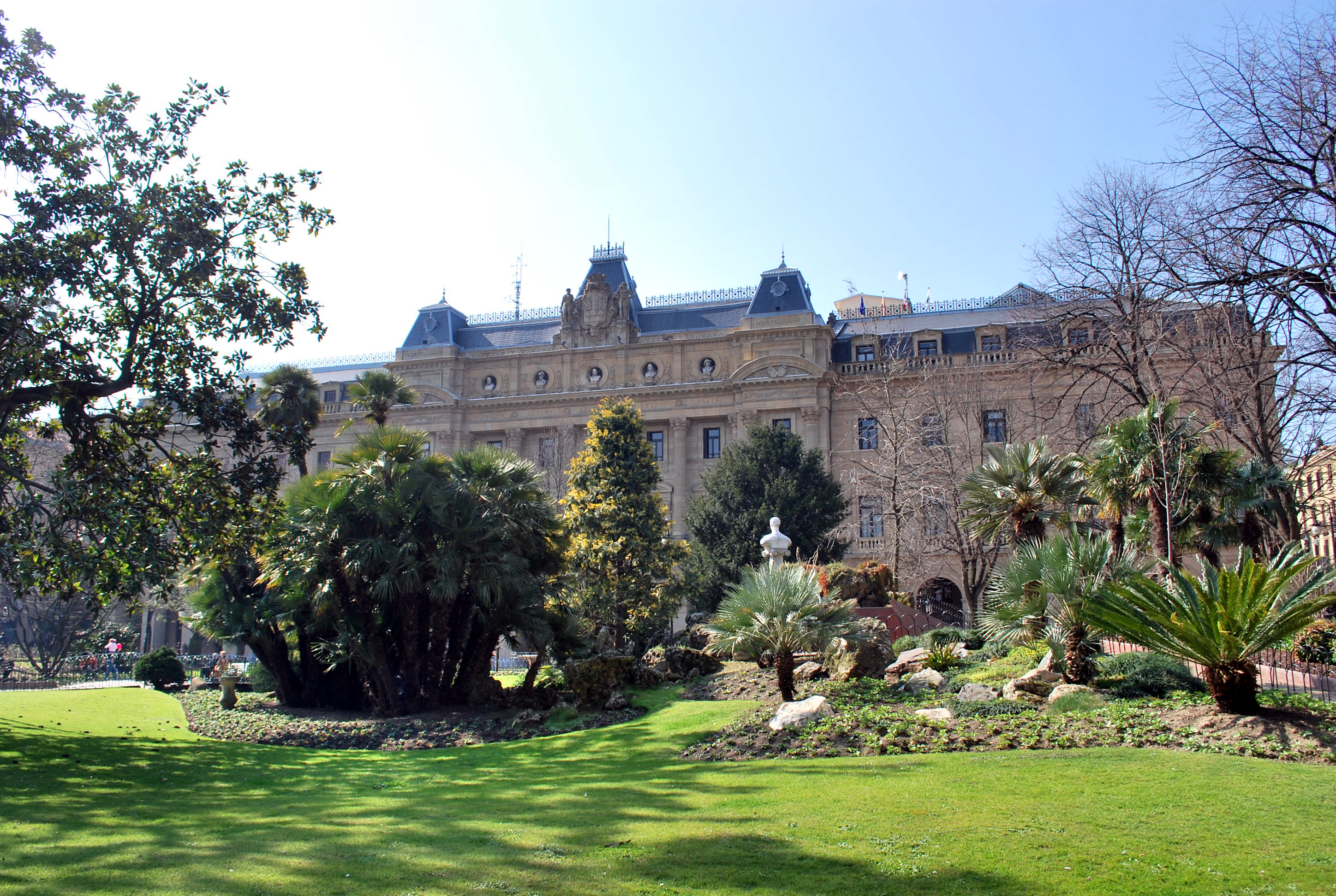 Députation Forale de Guipuscoa à Donosti (Guipuscoa).